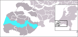 Escaut occidental